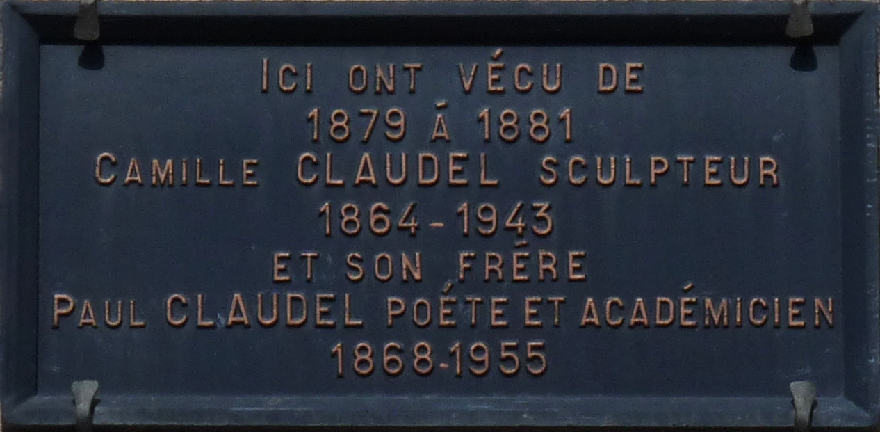 Maison Claudel à Wassy (Haute-Marne), au 11, rue du Val-du-Château. Maison du XVIIe siècle habitée de 1879 à 1881 par Paul et Camille Claudel